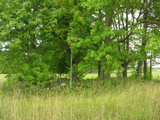 Bružų kaimo kapinaitės, Mažeikių raj., Tirkšlių sen. Foto: Algirdas, 2005 m. rugpjūčio 6 d.